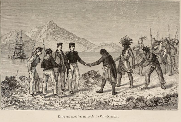 Arthur Mangin, Voyages et Découvertes outre-mer au XIXe siècle, illustrations par Durand-Brager, 1863 ː Les îles Nicobar.